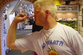 Jarkko Komula, finnischer Dartspieler